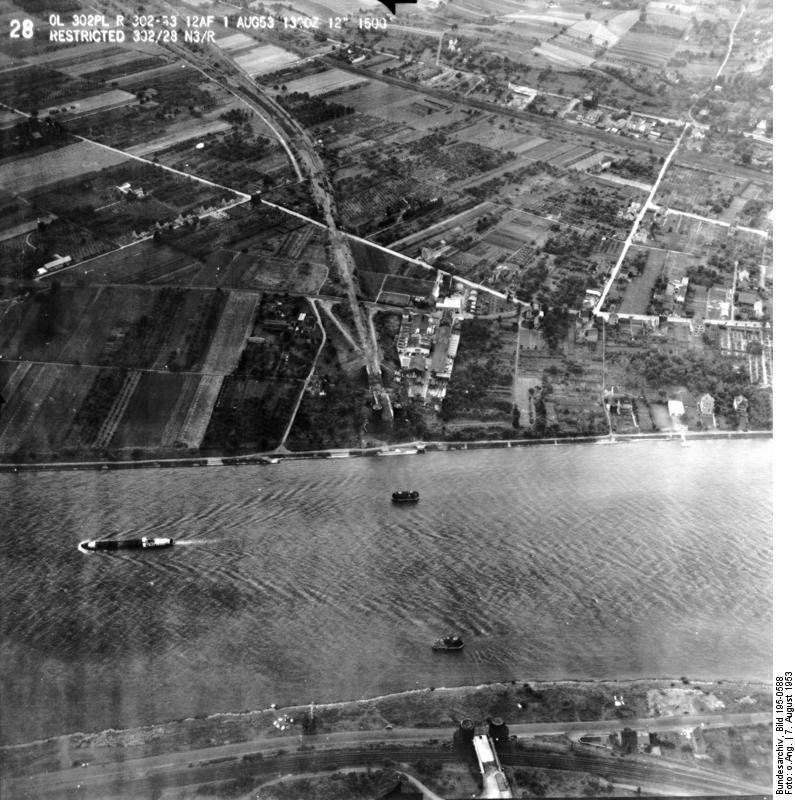 Rheinbefliegung der Alliierten 1953